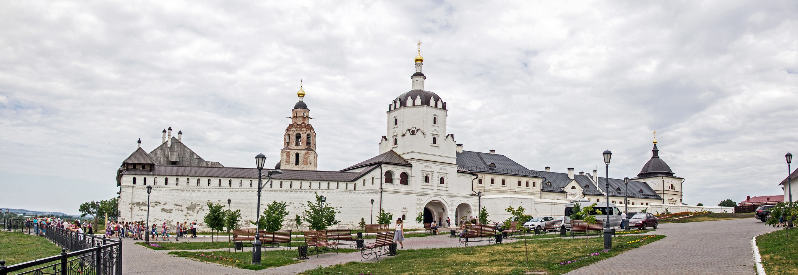 Ансамбль Успенского монастыря: Свияжск, Зеленодольский район, Татарстан